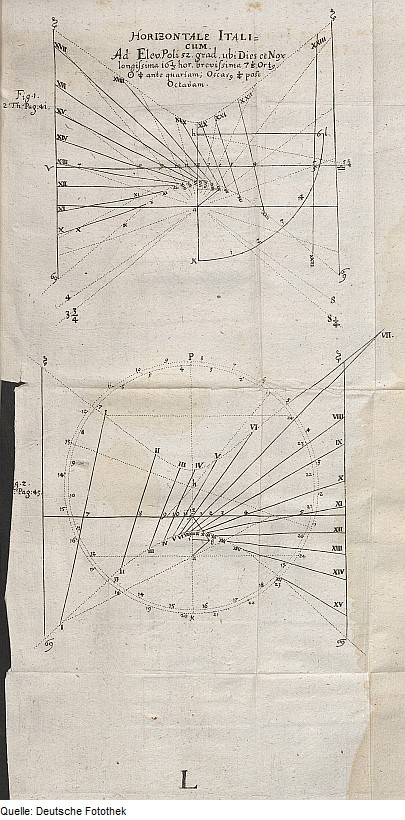 Original image description from the Deutsche Fotothek Astronomie & Gnomonik & Sonnenuhr